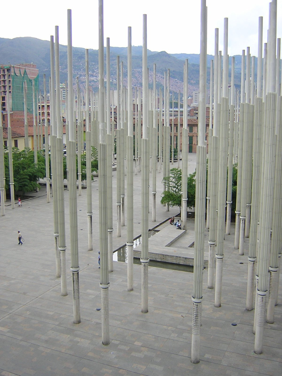 Plaza Cisneros, Medellín, Colombia